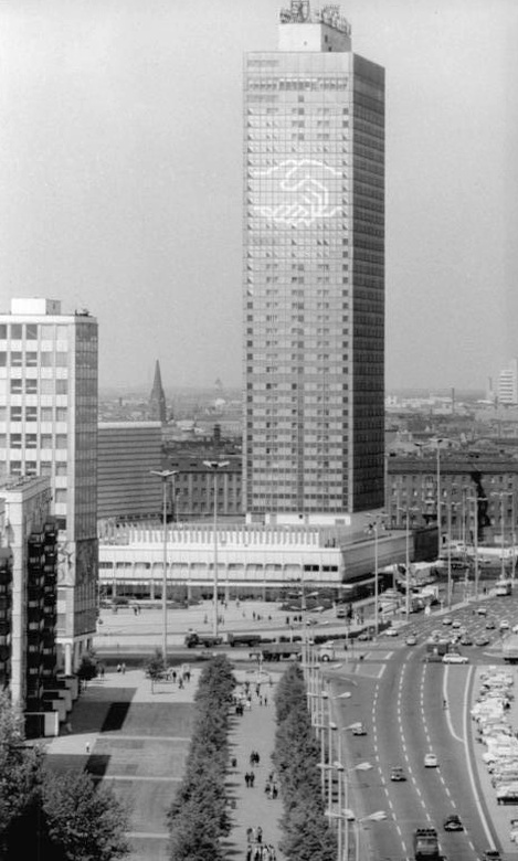 Berlin, Alexanderplatz, Hotel "Stadt Berlin" ADN-ZB Koard 13.5.76 Berlin: Weithin sichtbar ist das Schmuckelement zum IX. Parteitag der SED am Interhotel "Stadt Berlin".